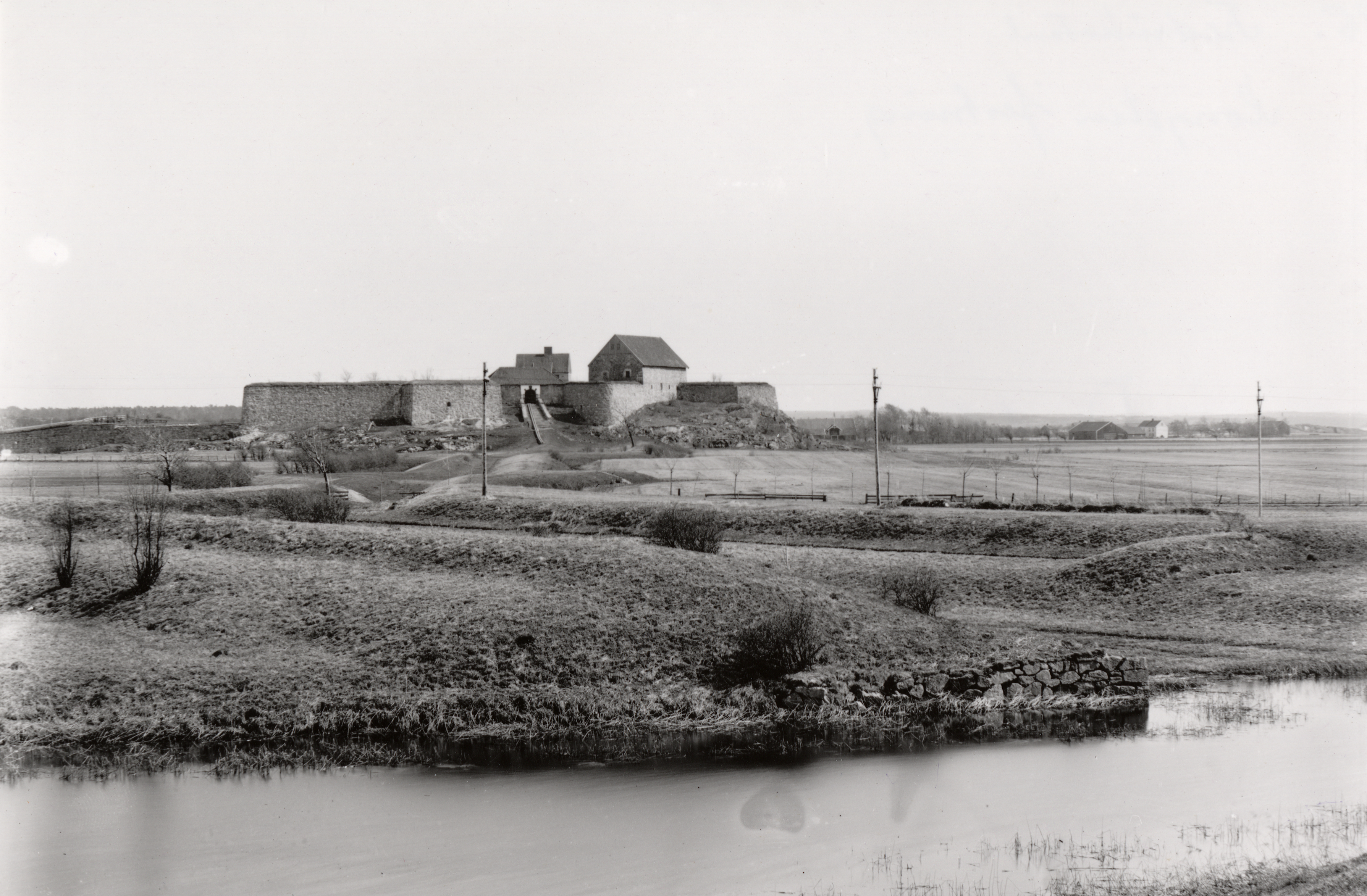 Kongsten fort, Kongsten festning i Fredrikstad, Østfold